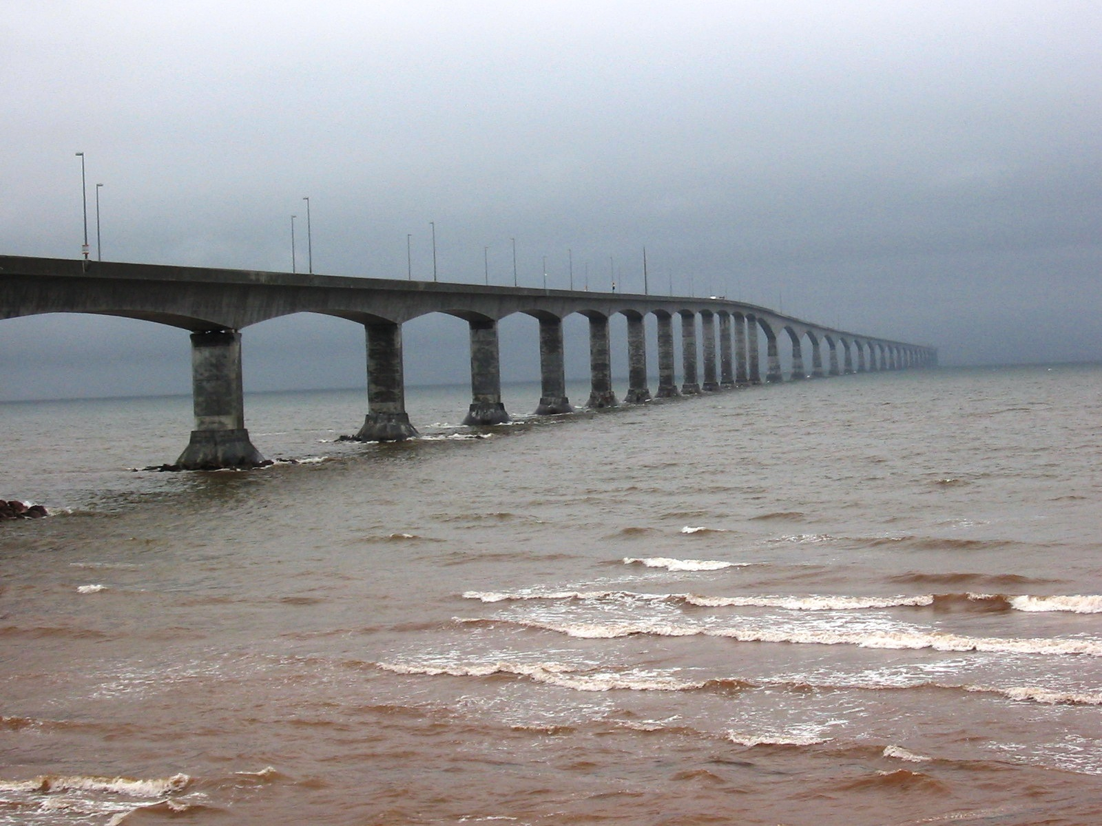 Pont de la Confédération, depuis Cape Jourimain.